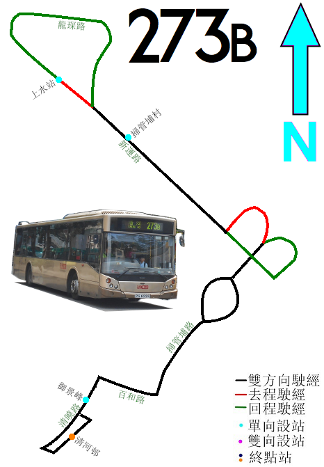 中文（香港）: 九巴273B線的走線圖